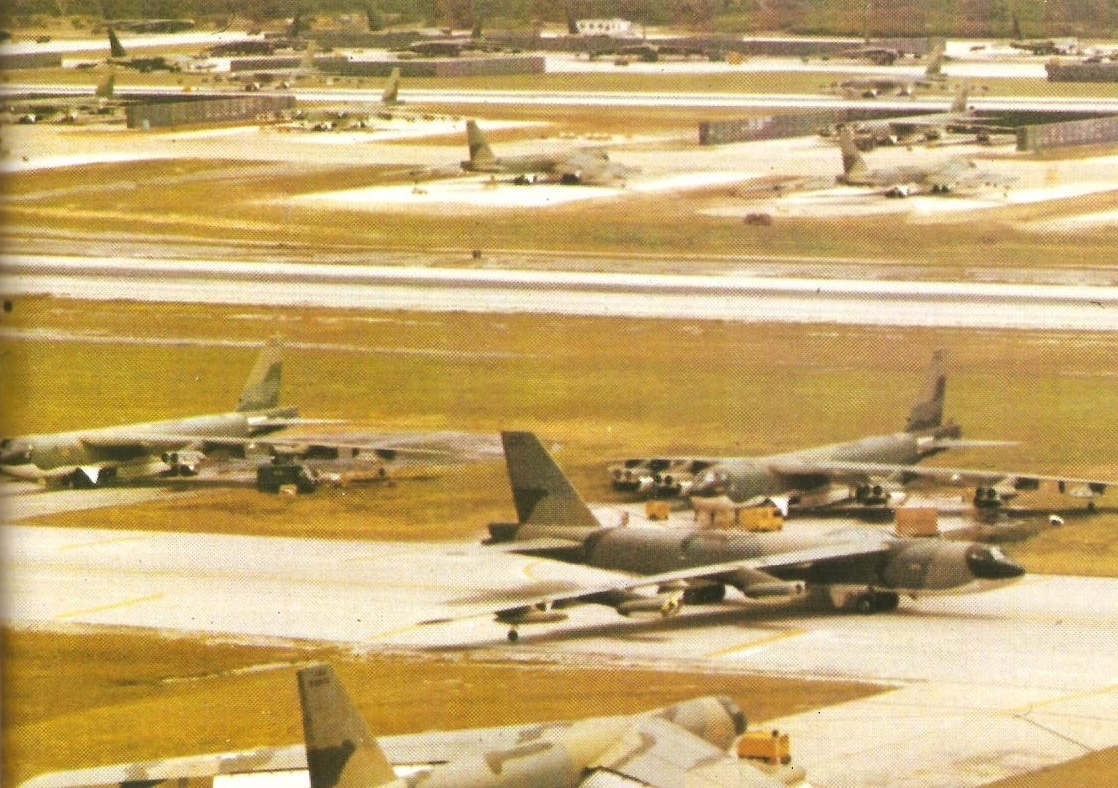 Bpmbardieri B-52G del SAC schierati a Guam nella base Anderson per partecipare all'operazione Linebacker II